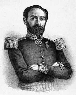 "Le général Cavaignac, président du conseil, chef du pouvoir exécutif".